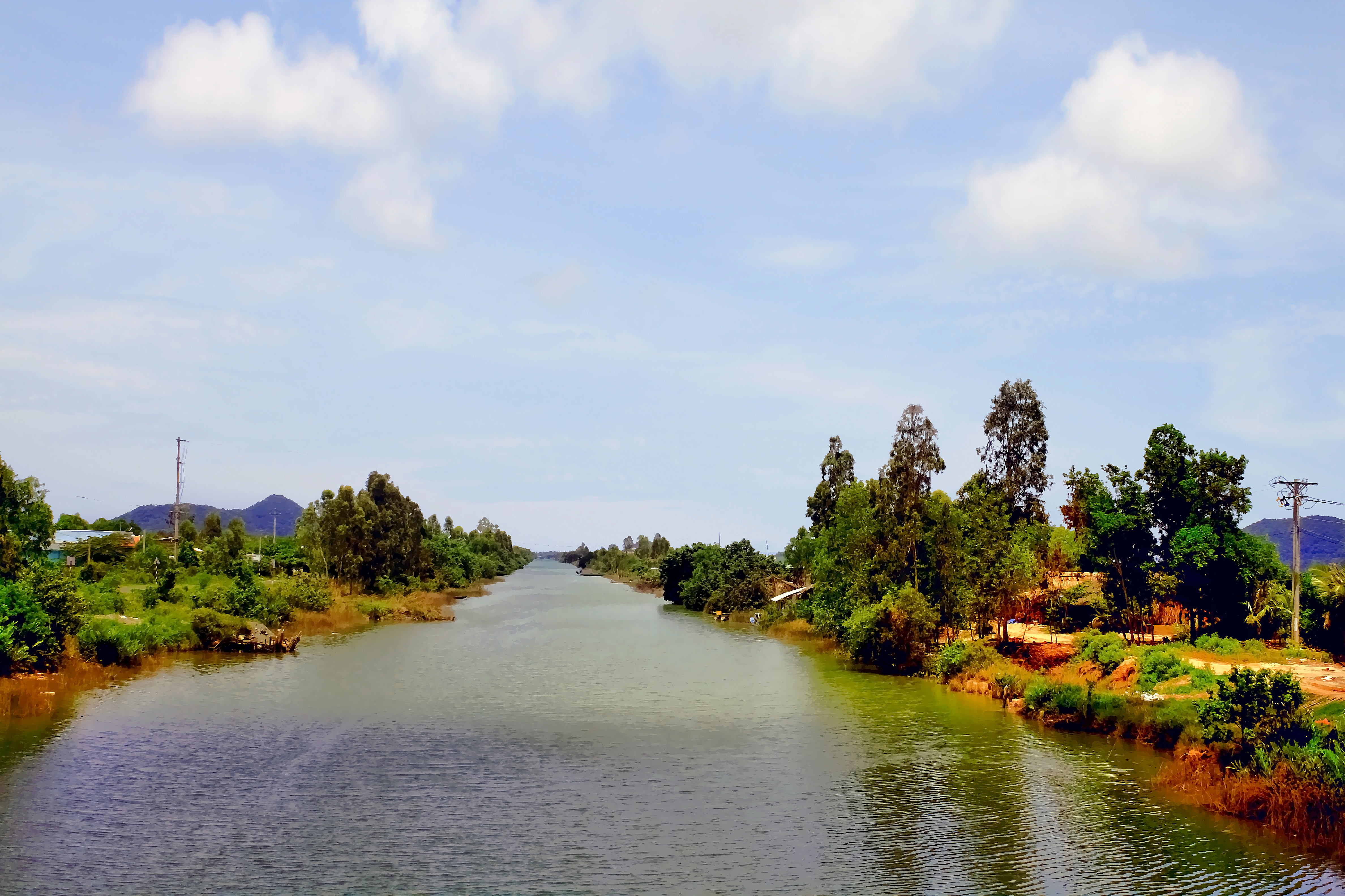 Kênh Hà Giang, đoạn chảy qua xã Phú Mỹ, huyện Giang Thành, Kiên Giang, Việt Nam.